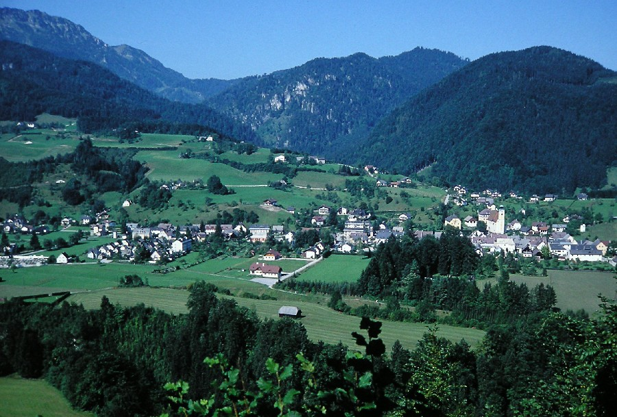 Aussicht auf Sankt Gallen (Steiermark)